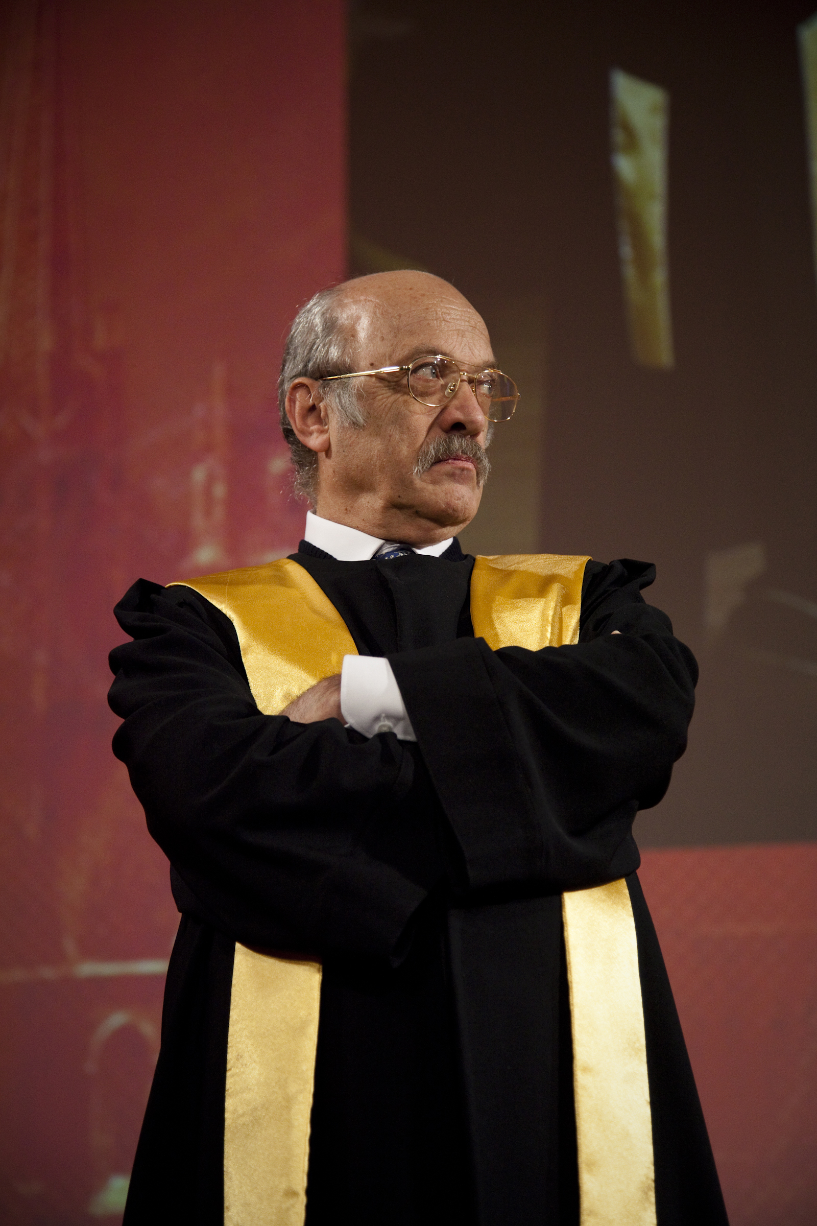 Jean-René Ladmiral, Traductologue